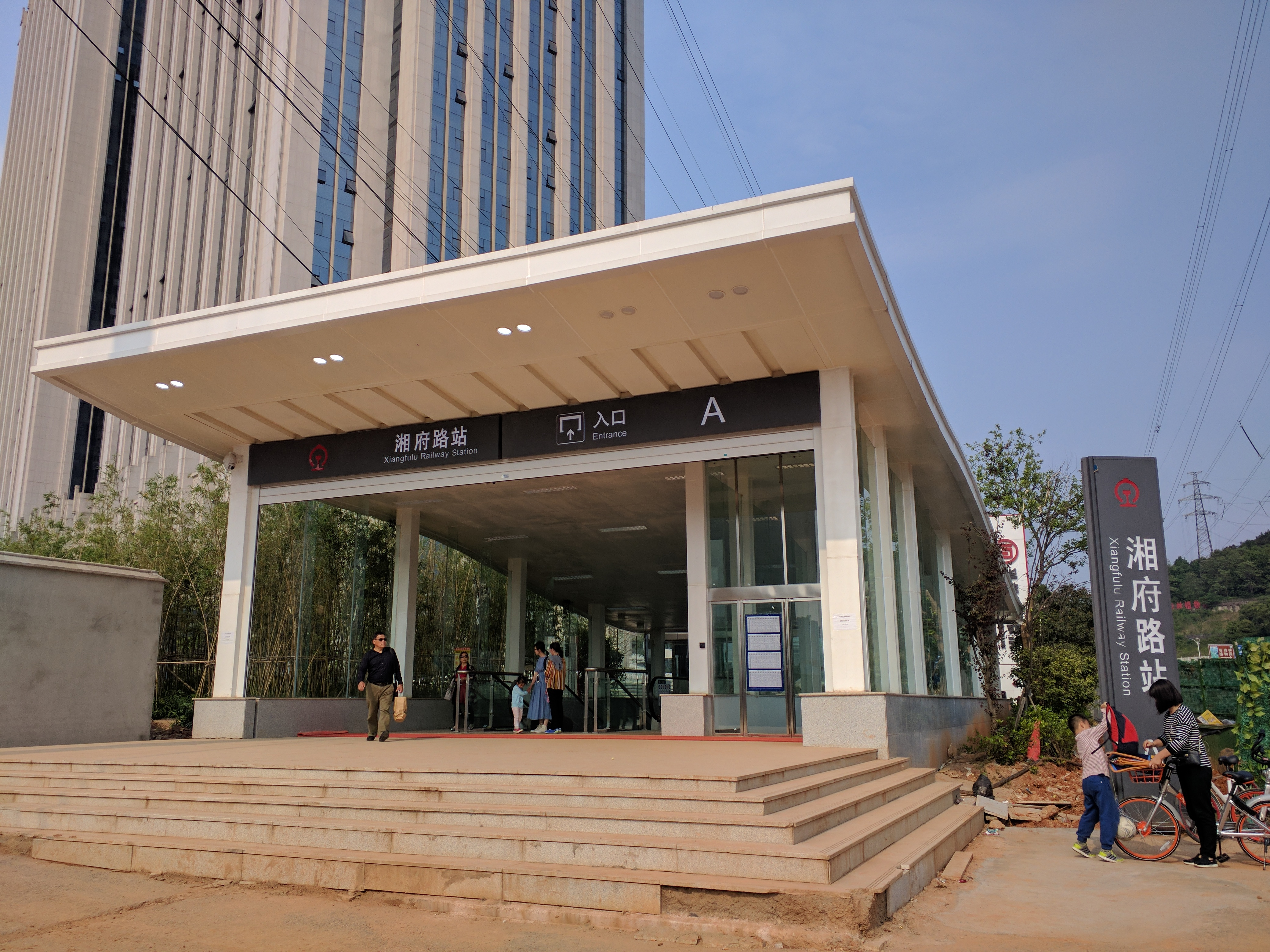 中文（中国大陆）: 长株潭城际铁路湘府路站A出入口